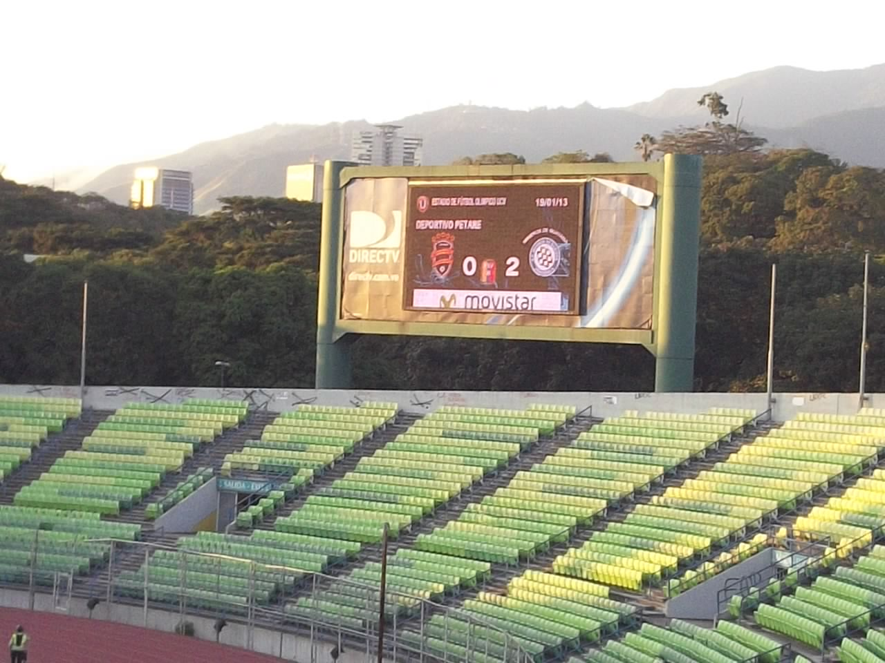 Pantalla Del Olimpico en 2013